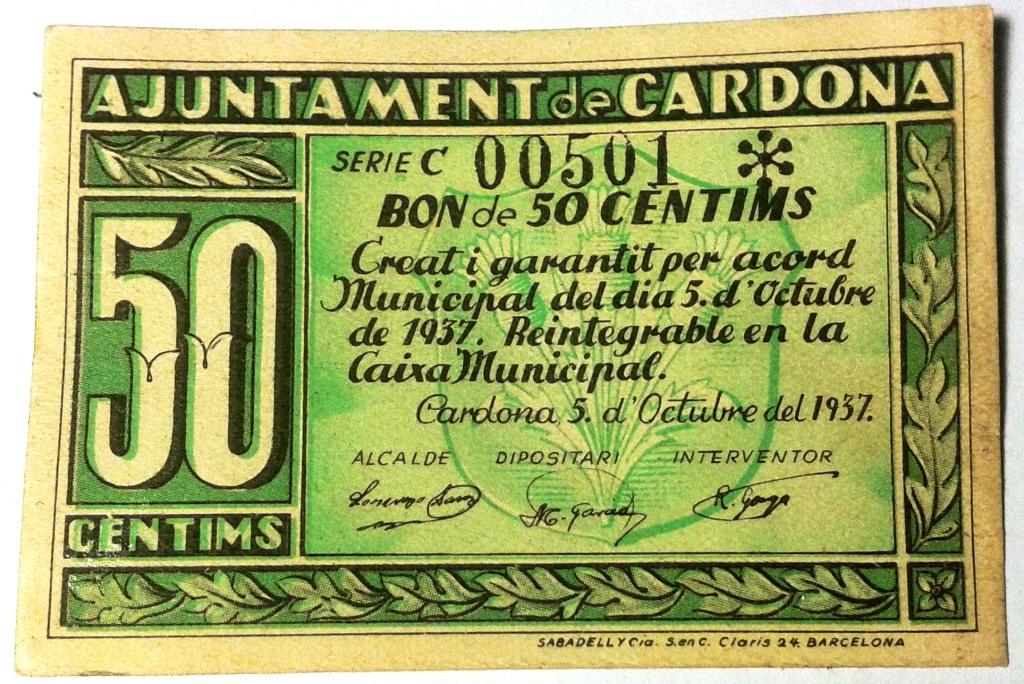 Bitllet de 50 centims imprès per l'ajuntament de Cardona a la Guerra Civil.